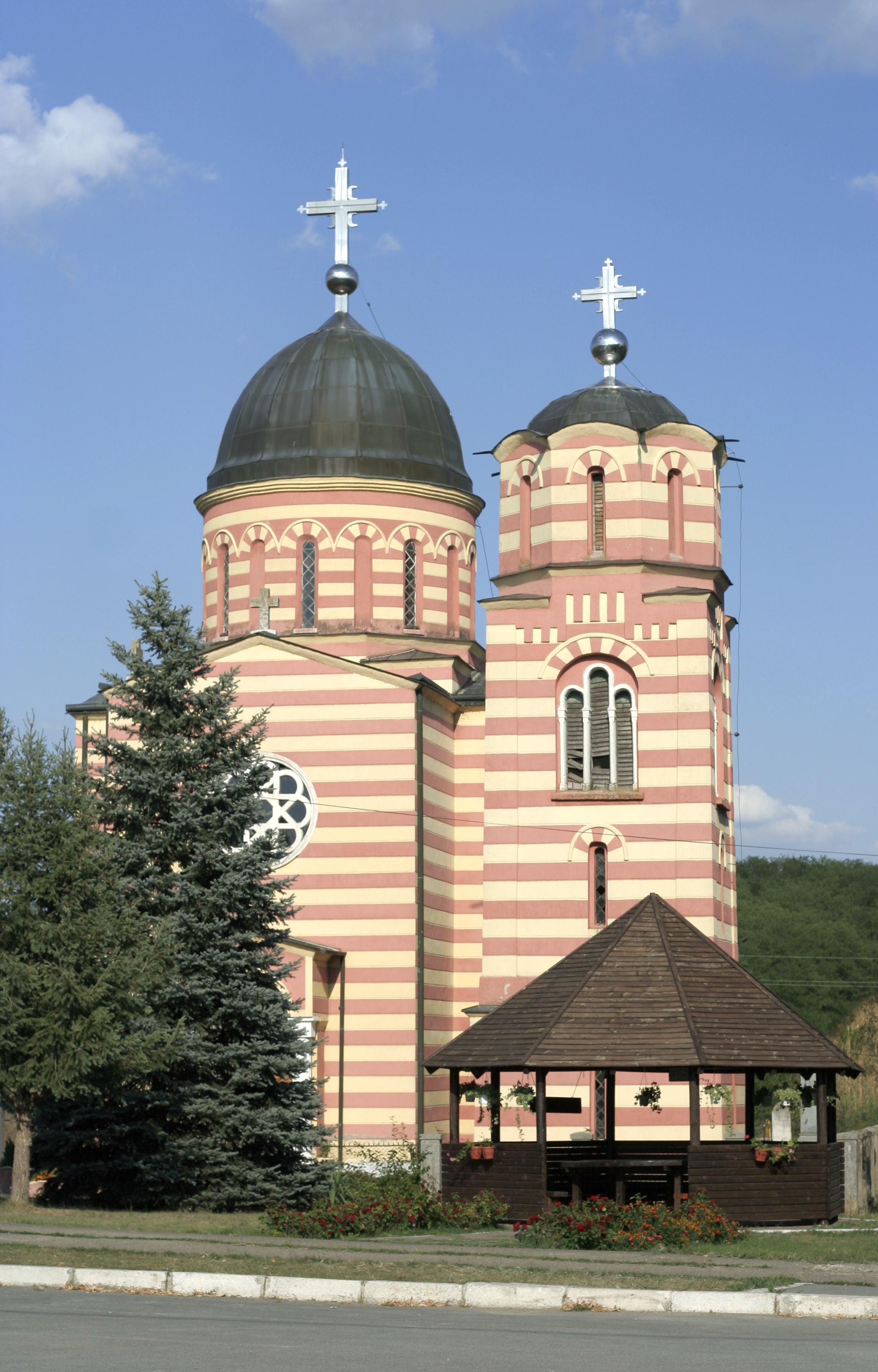 Манастир Грабовац, предња страна